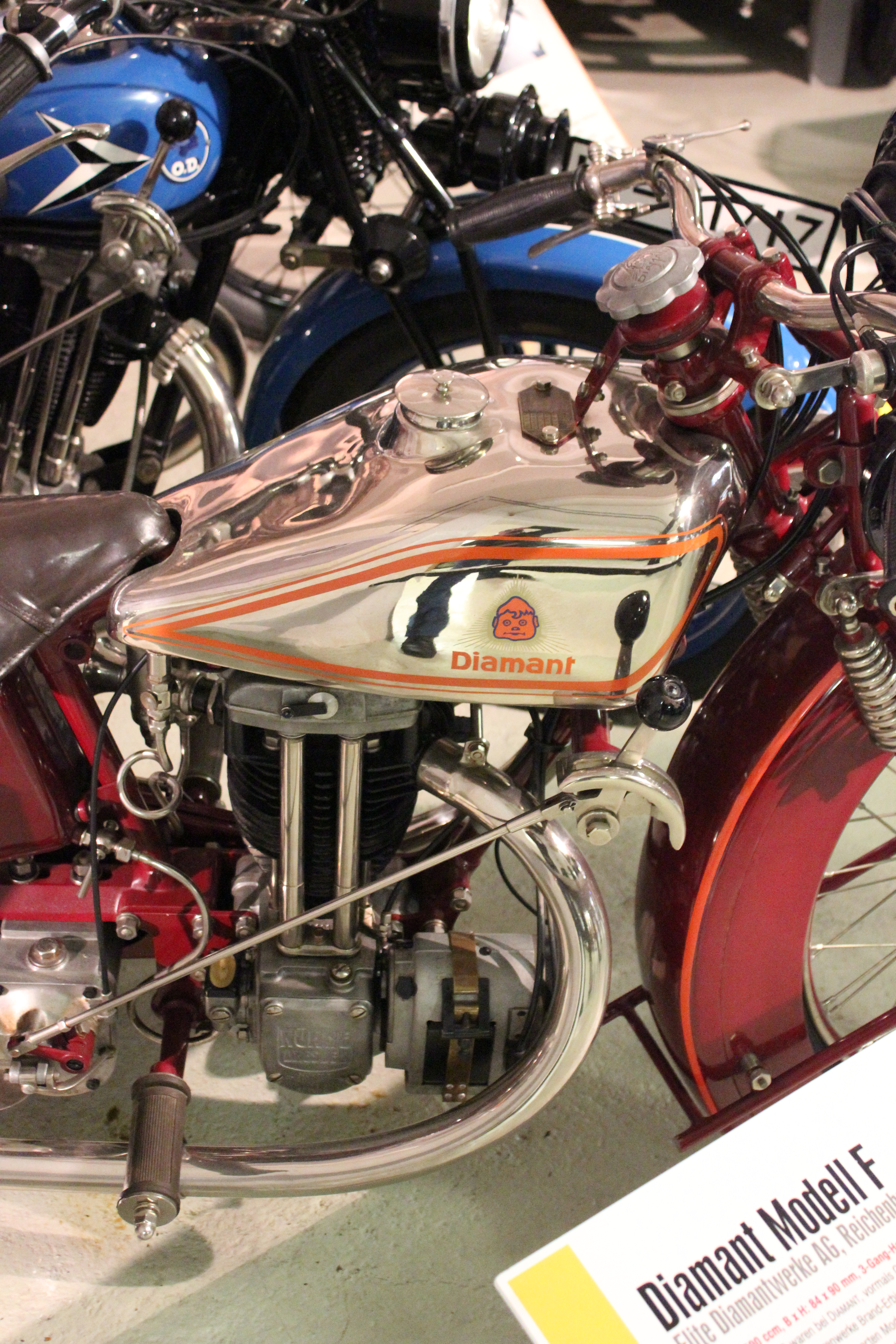 Diamant Emblem und Motor beim Motorrad Diamant Typ F Exponat des Museums für sächsische Fahrzeuge